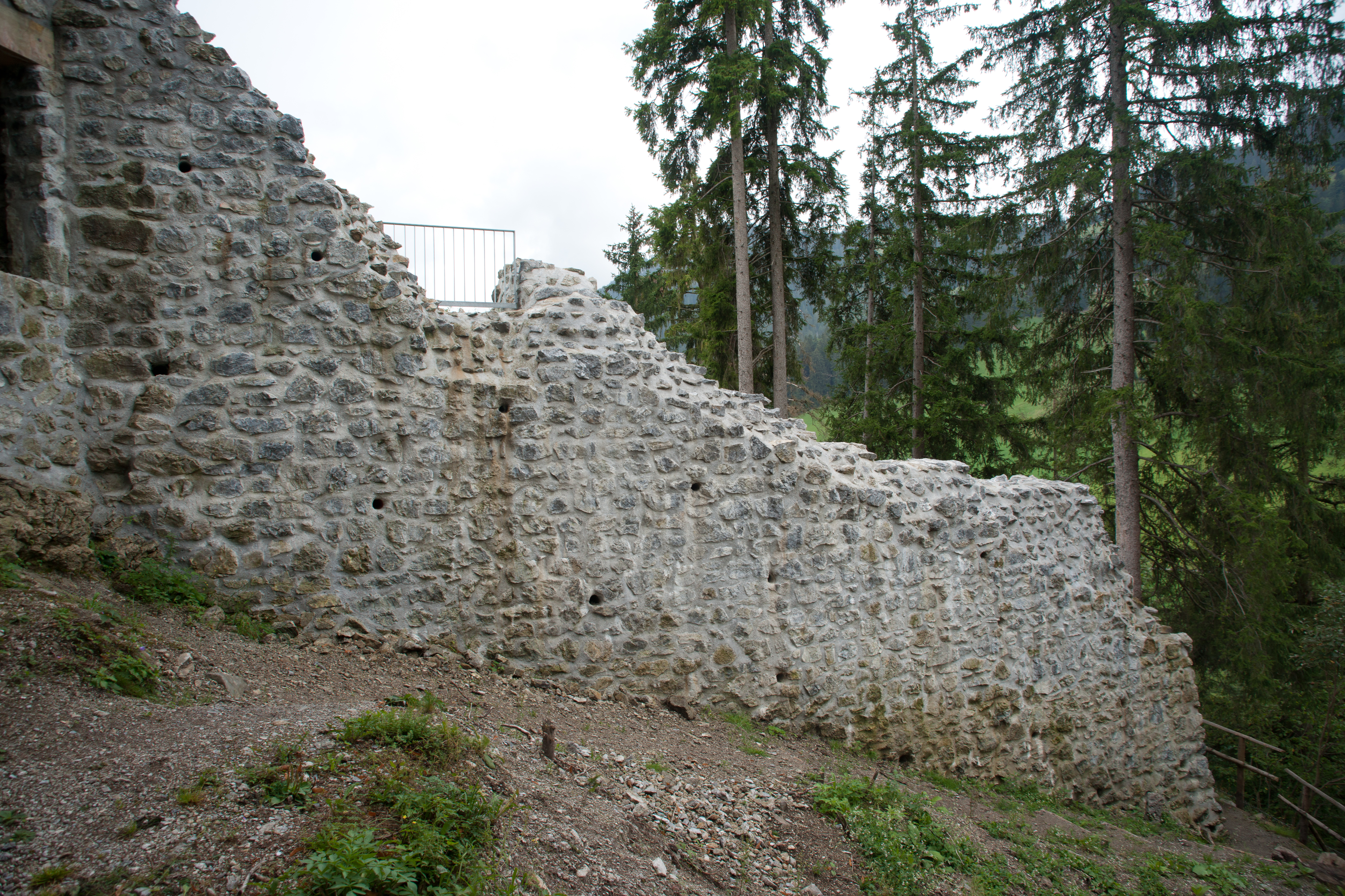 Ruines du château Unterer Mannenberg à Zweisimmen, canton de Berne.